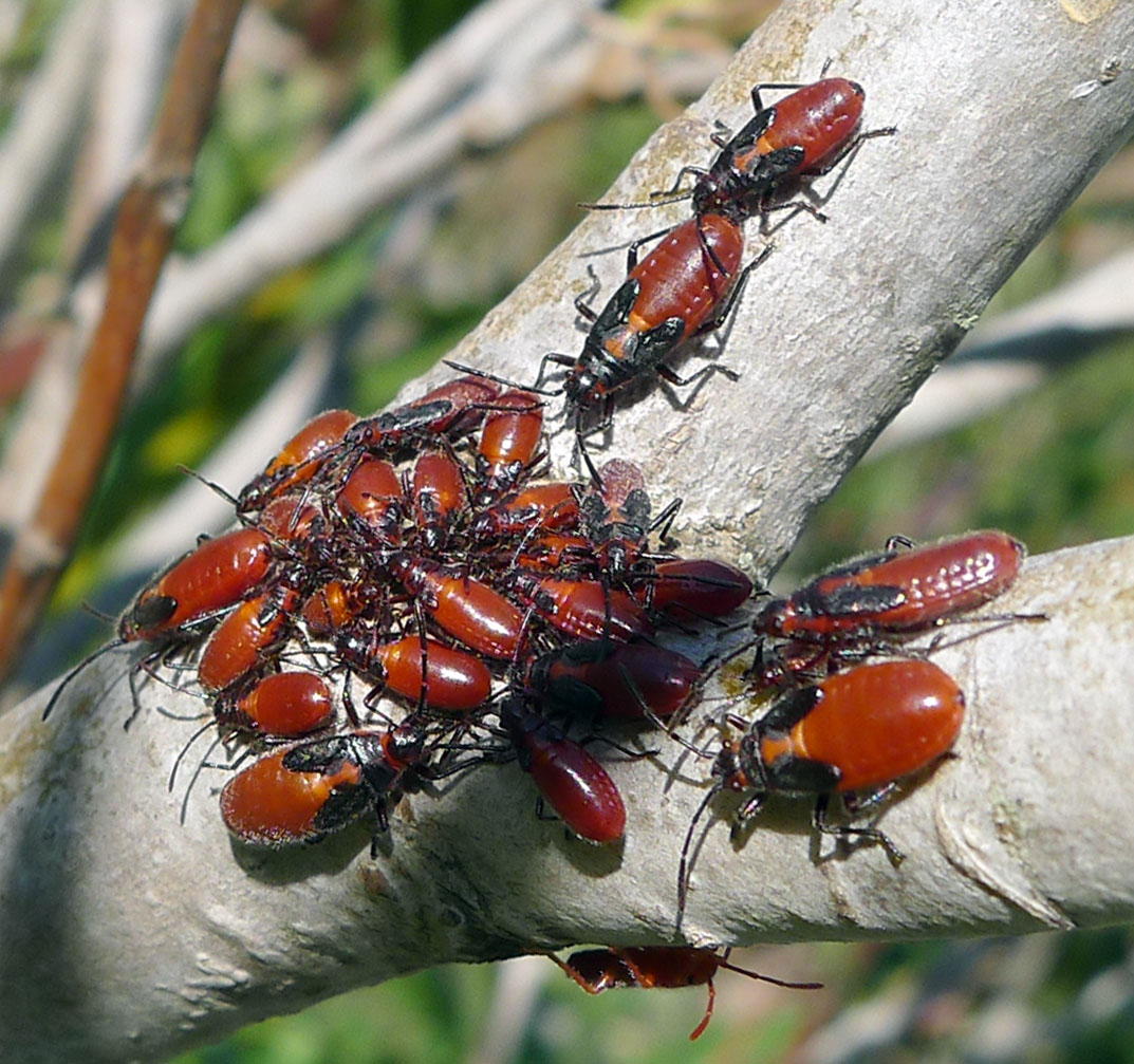 Caenocoris nerii nymphs. Lygaeidae. Hemiptera